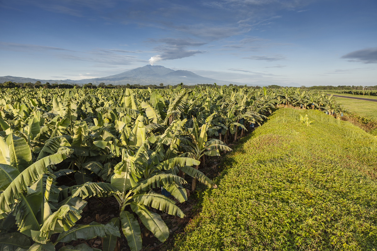 Banana plantain in Costa Rica, Turrialba volcano in the background.